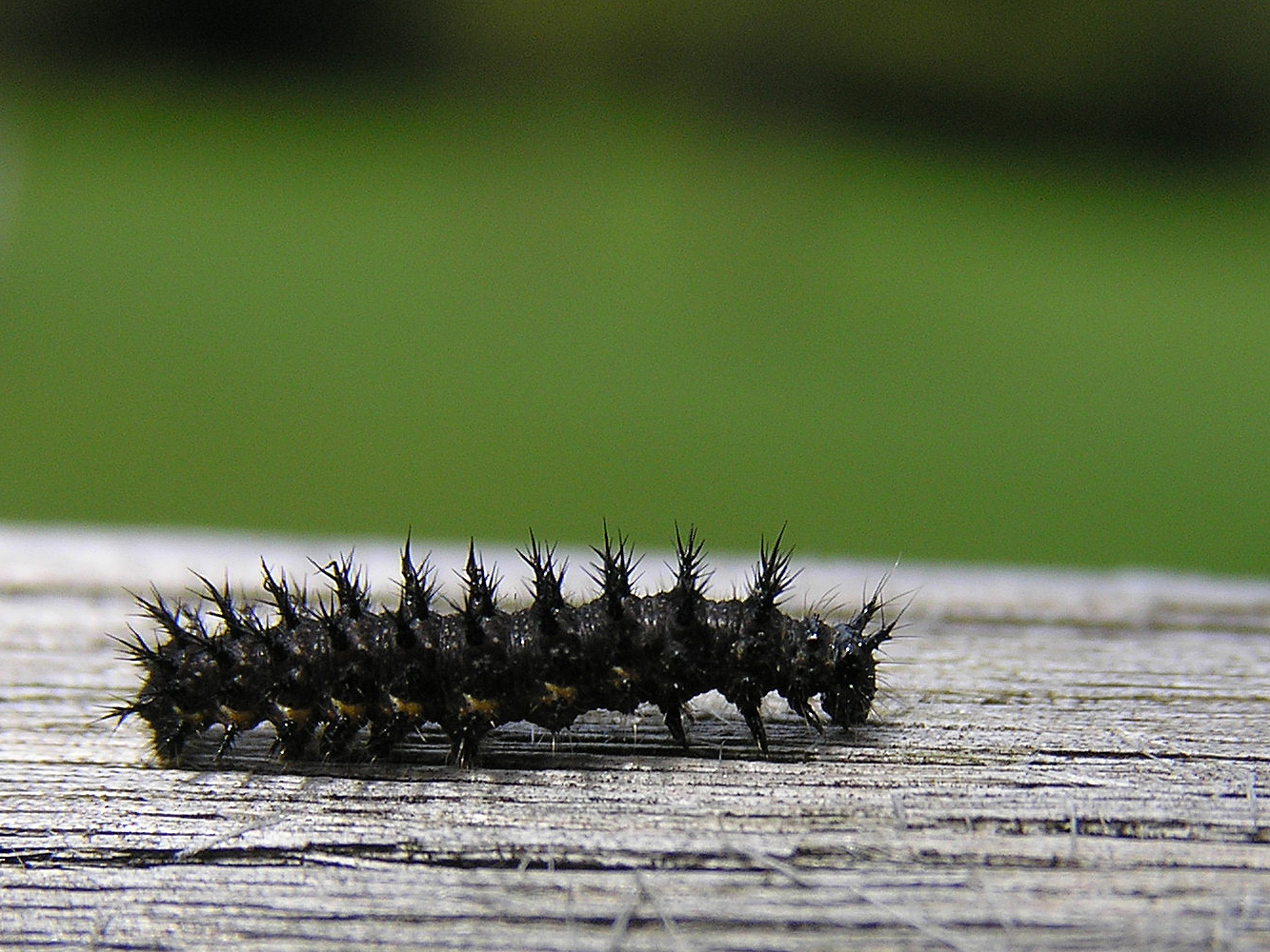 Araschnia levana (Landkärtchen). Gefunden auf einer Brennnessel, wurde die Raupe zum Fotografieren auf ein Stück Holz gesetzt.